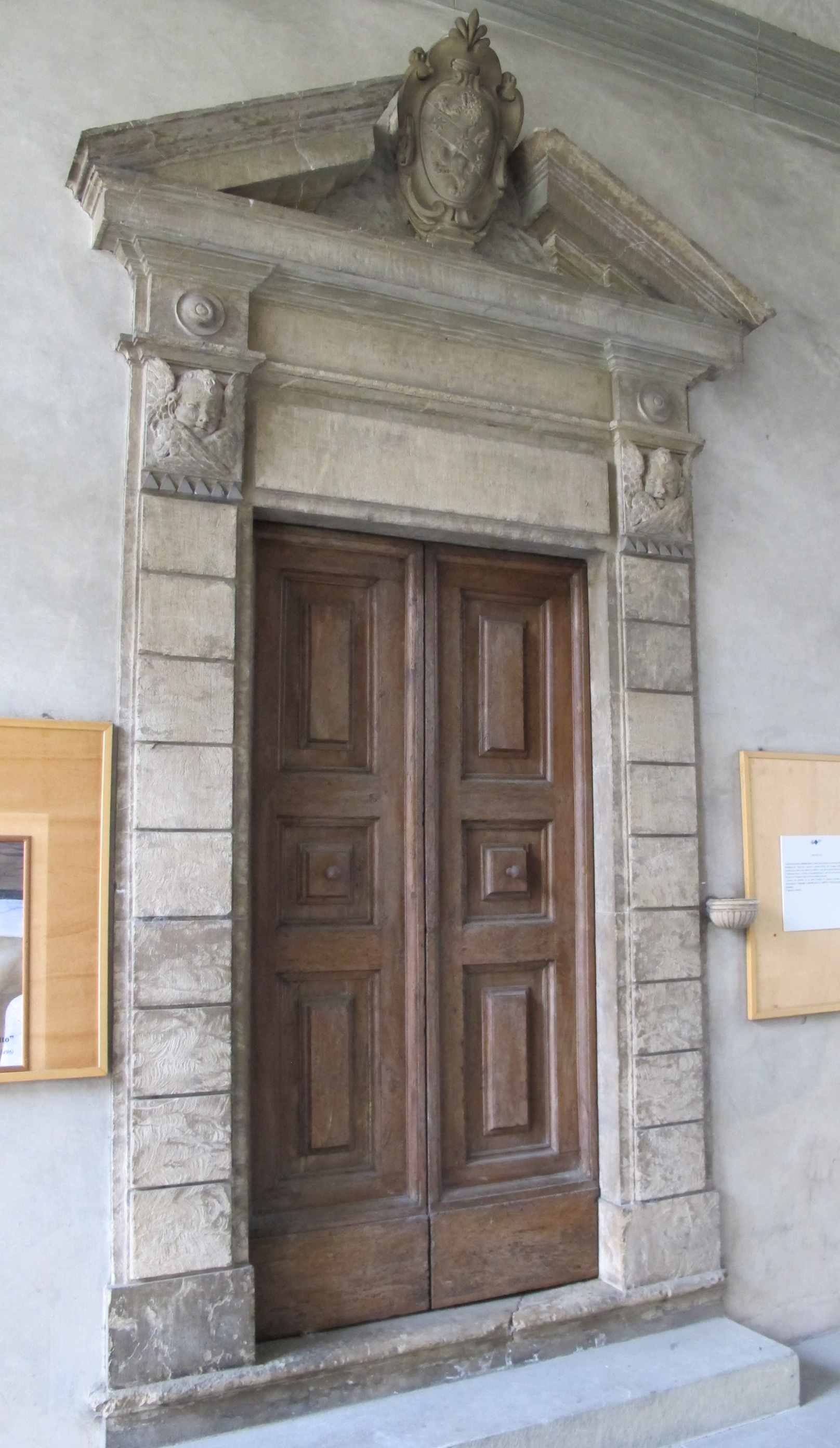 Santa maria maddalena de' pazzi, fi, portico, portale